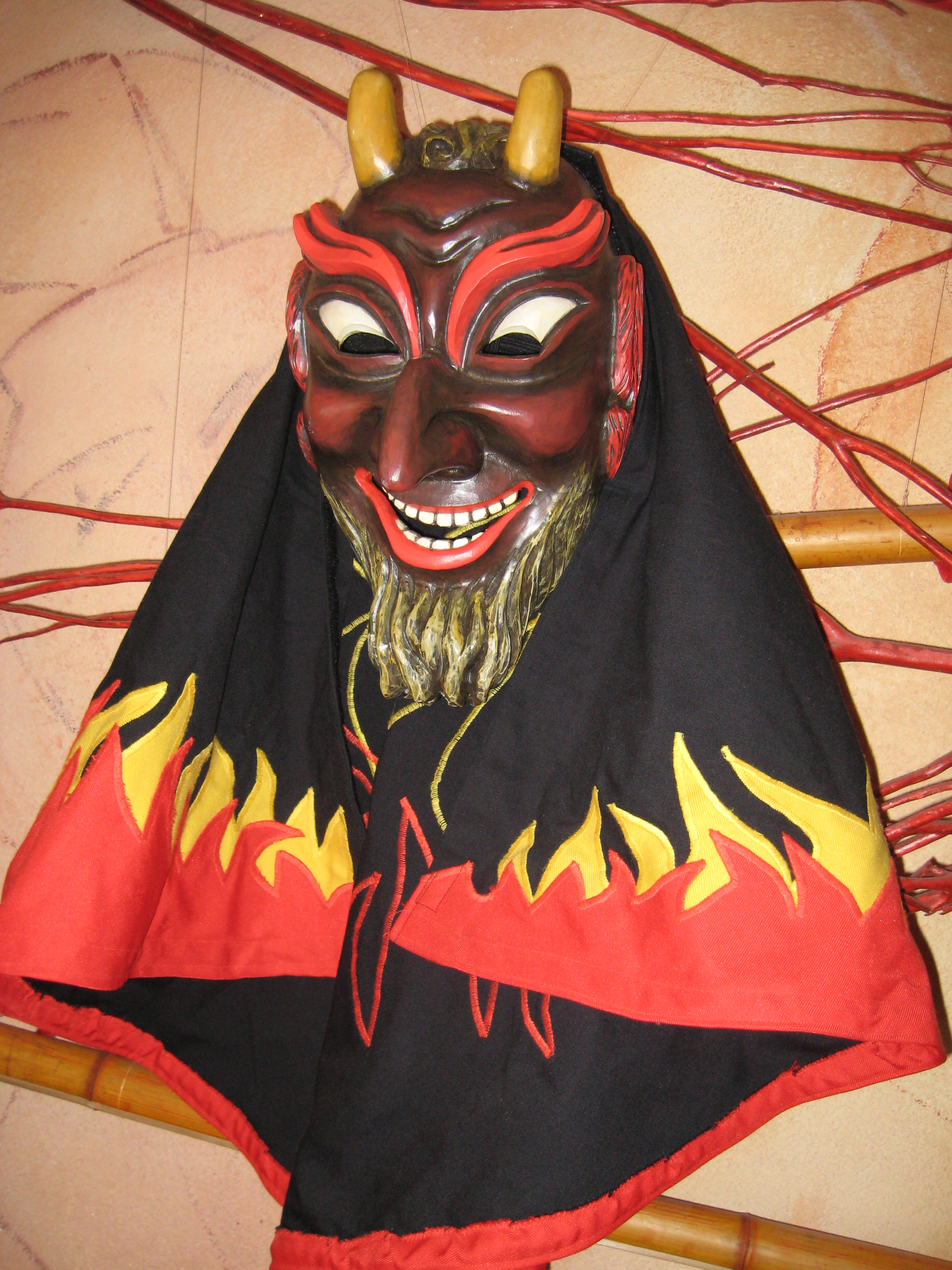 Maske: Feuerteufel der Narrenzunft Feuerteufel Gerhausen e. V.